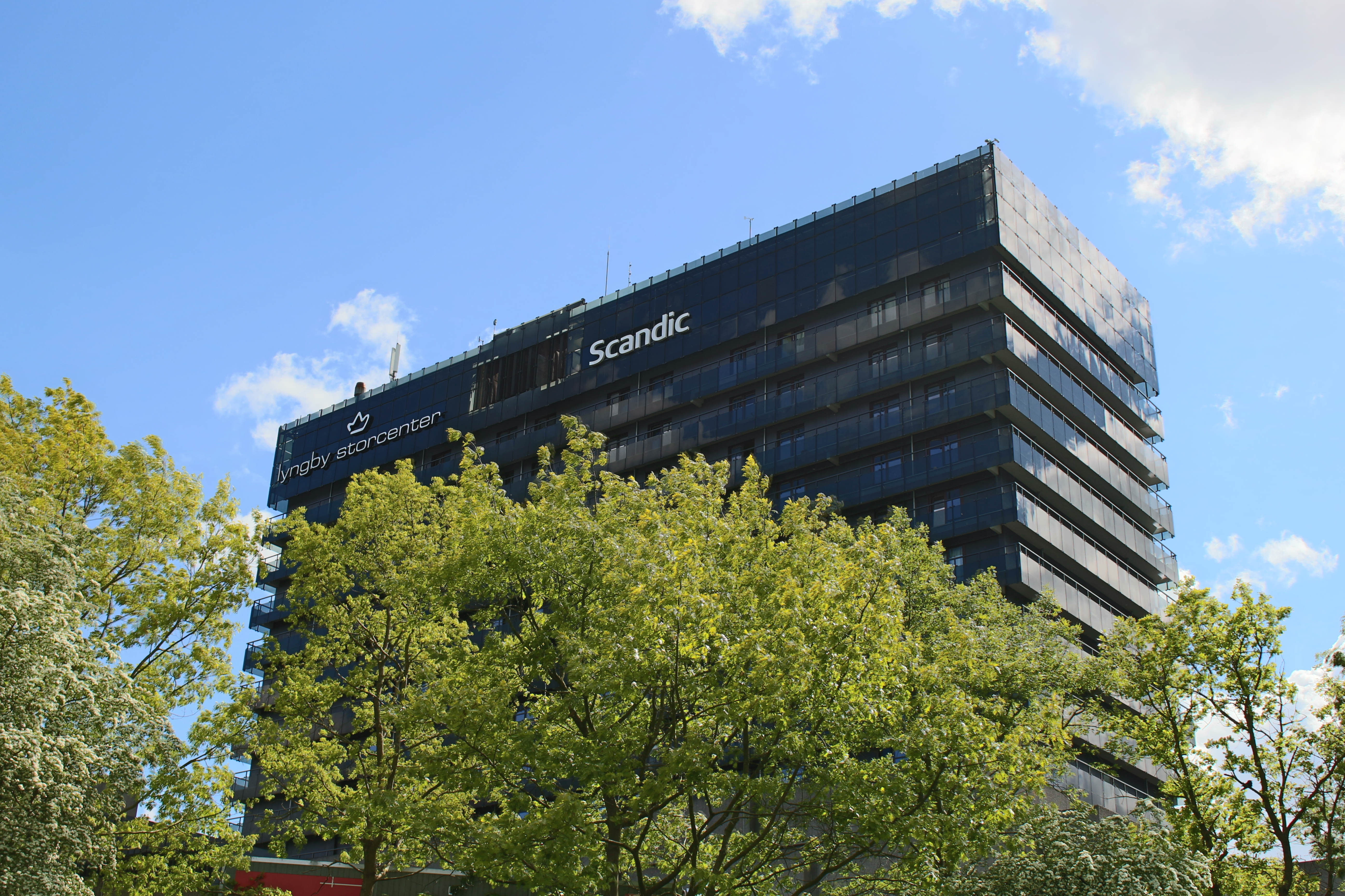 Lyngby Storcenter med Hotel Scandic Eremitage.